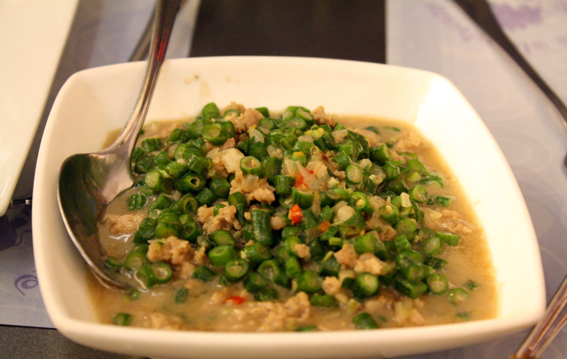 March 26, 2012